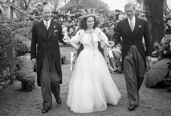 Stockholms Mälardrottning på Solliden, Skansen